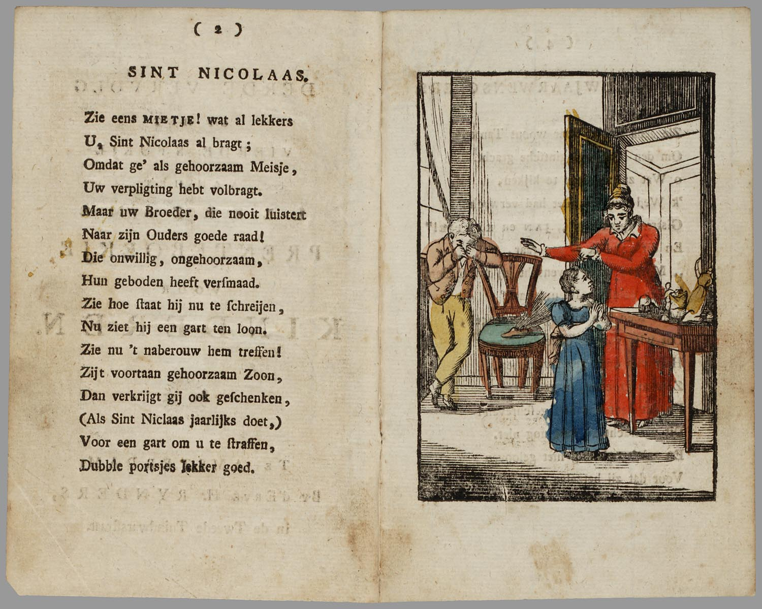 Prentenboek met 8 (wat slordig) ingekleurde houtgravures naast rijmende teksten op dubbelzijdig bedrukte bladen. De onderwerpen komen uit het dagelijks leven: Sinterklaas brengt lekkers en een 'gart'; tante krijgt een zelfgeschreven zegewens voor Nieuwjaar; moeder en kinderen gaan naar de kerk; een jarige vader krijgt een gedicht van zijn zoon; de meester geeft een wijze les voor de vakantie; de kinderen hebben een prentenboek en een prent gekregen; afscheid van de meester bij het verlaten van de school; een vlieger oplaten. Gedrukt op handgeschept papier. Zie ook: :Lust en Leering, p. 50. Derde vervolg of het vierde stukje Derde vervolg of het vierde stukje // 16 p : handgekleurde houtgravures 16 cm // Waller 1366 // Datering: volgens Nederlandse Bibliografie 1801-1832 // Bevat: Sint Nicolaas ; De nieuwjaarwenschers ; Het ter kerkgaan ; De verjaring ; De vacantie ; De kinderen met de prijzen ; Afscheid van de kinderen aan hunnen meester ; Zomervreugd Prentenboeken // Gedichtenbundels